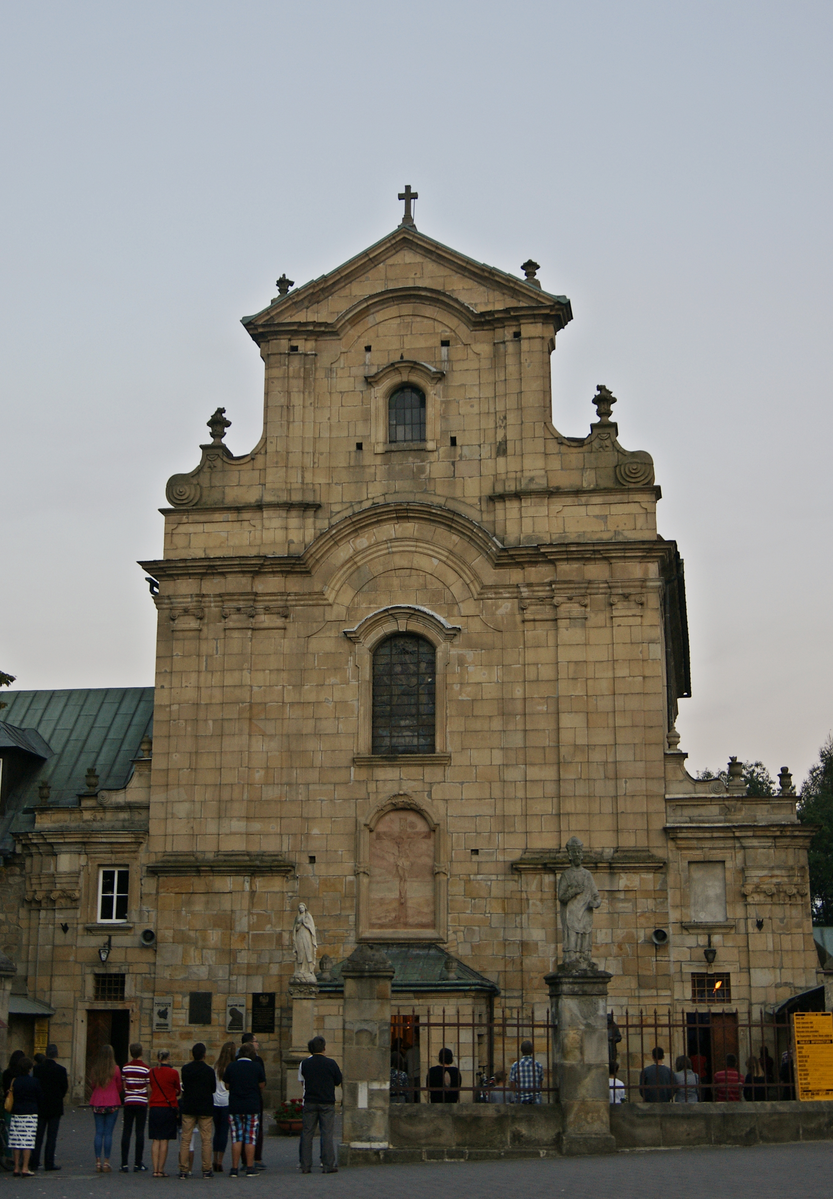 Krosno, kościół p.w. Podwyższenia Krzyża, 1771-1811